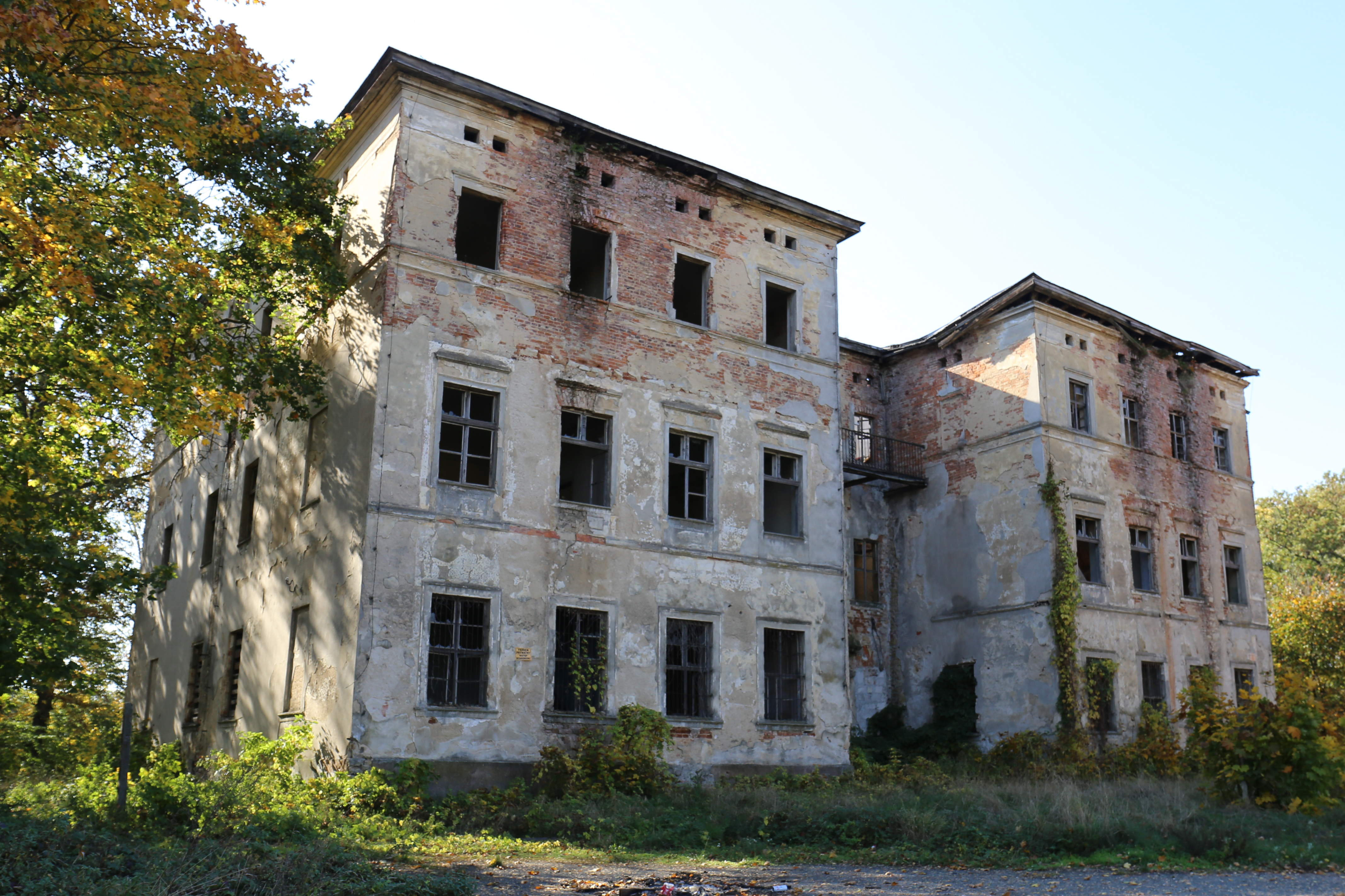 Czerńczyce – wieś w Polsce, w województwie dolnośląskim, w powiecie wrocławskim, w gminie Kąty Wrocławskie.